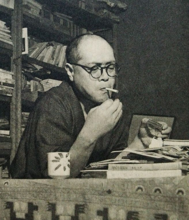 竹内好